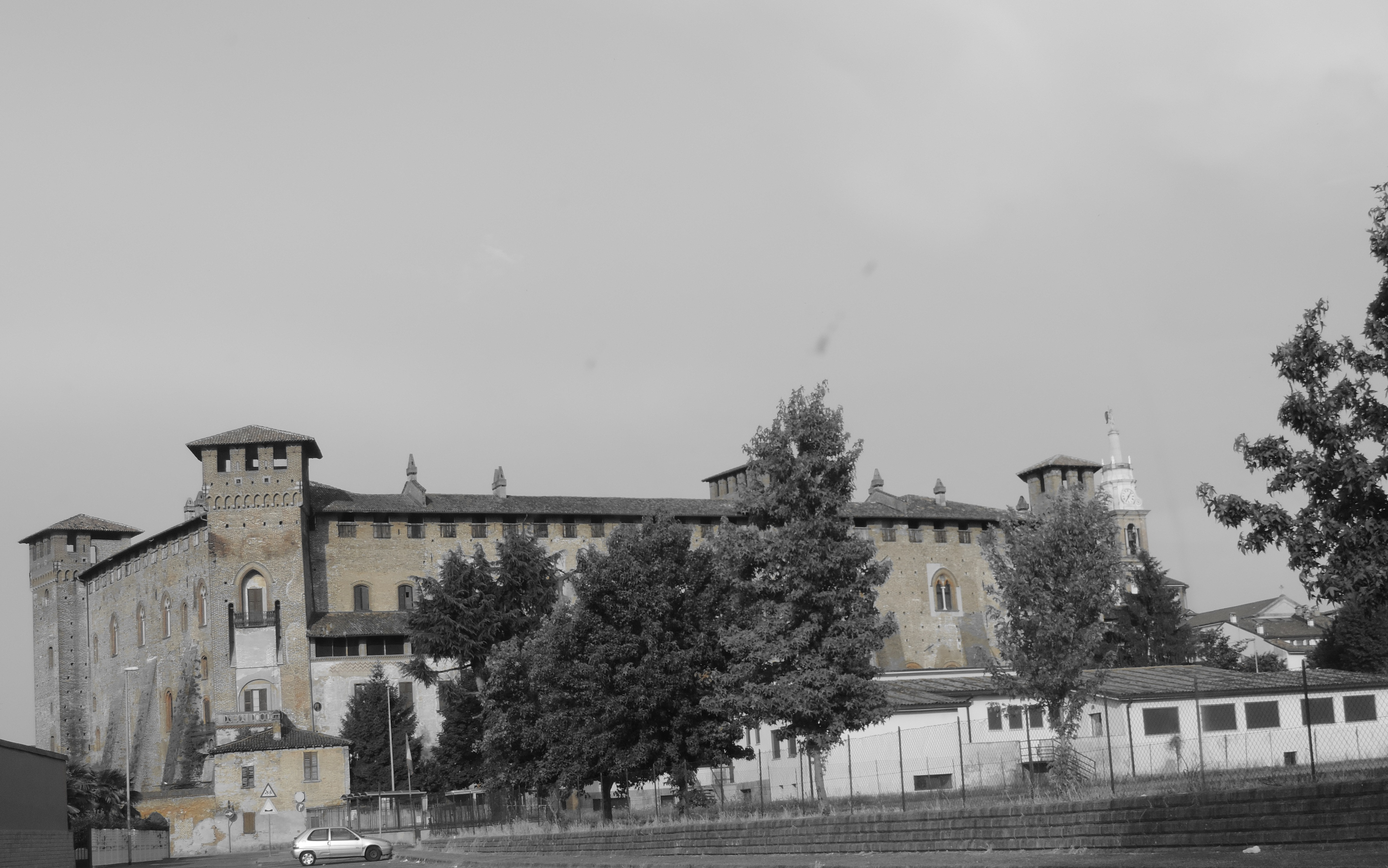 Castle Sant’Angelo Lodigiano